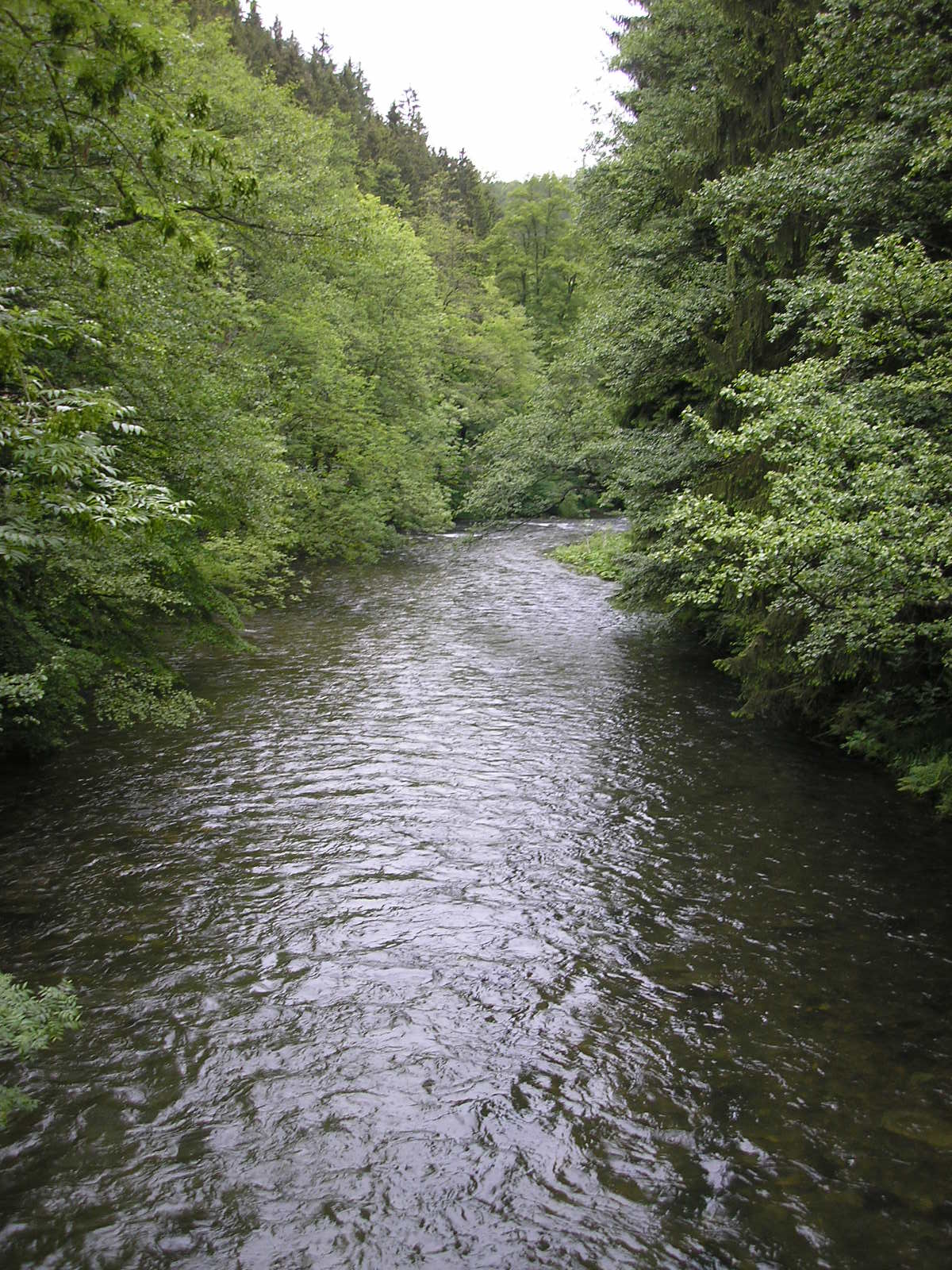 Die Schwarza bei Schwarzburg (Thüringen); FFH-Gebiet „Schwarzatal ab Goldisthal mit Zuflüssen“